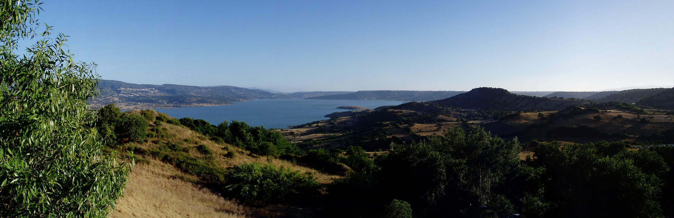 Visto dal santuario di Santu Antine - Sedilo (OR)